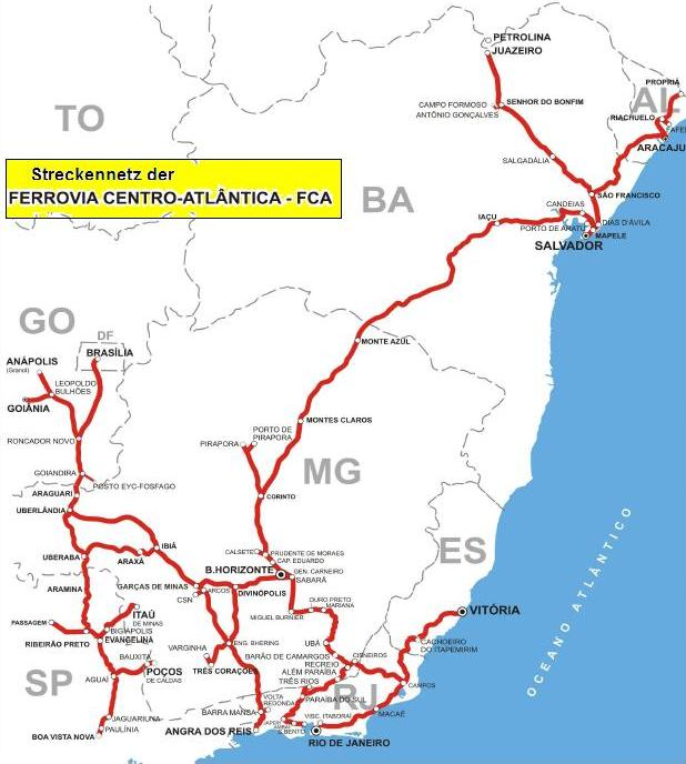 Streckennetz der Bahngesellschaft FCA Brasilien 2010